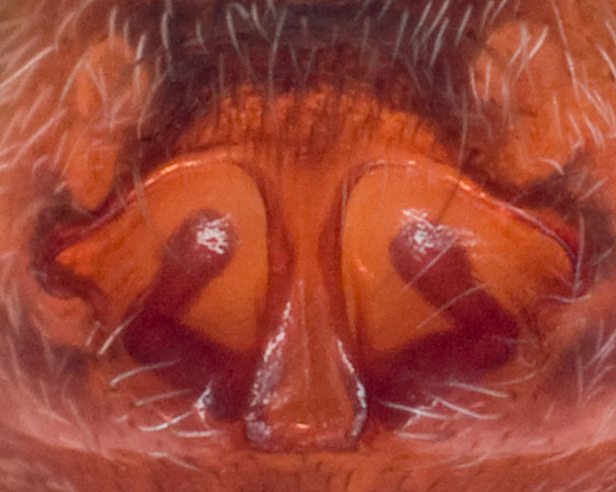 Epigynum of Pardosa pullata